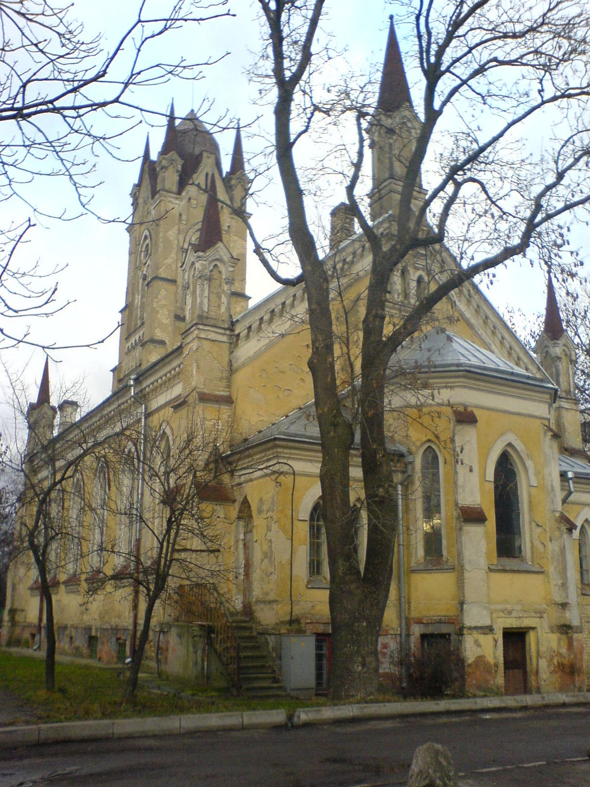 Беларуская (тарашкевіца): Кірха ў Гародні